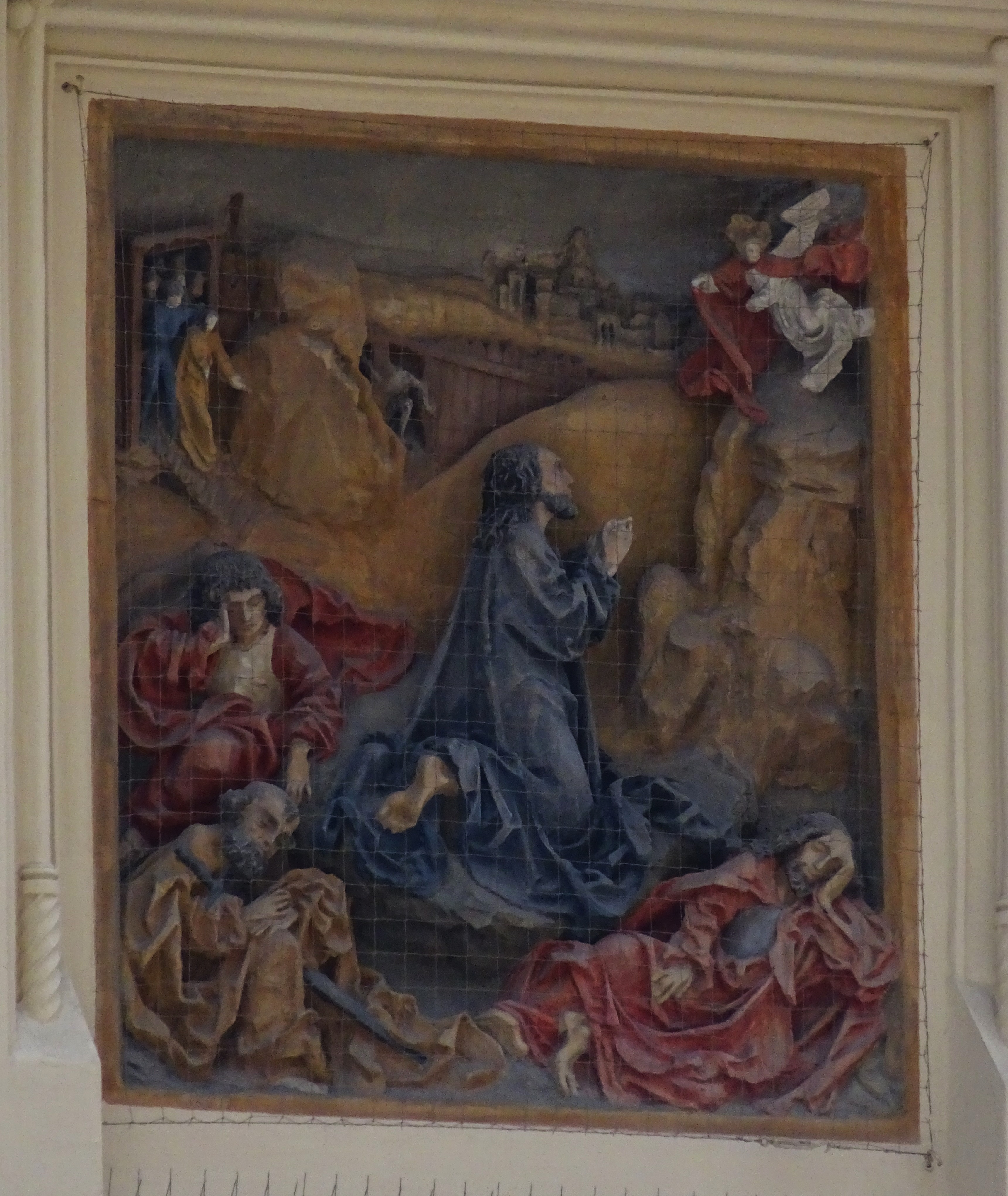 Płaskorzeźba Jezusa w Ogrojcu - kopia dzieła Wita Stwosza w elewacji Kamienicy Pod Ogrojcem w Krakowie przy Placu Mariackim 8.